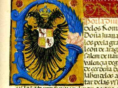 Fragmento del Título de Villa de Castilblanco